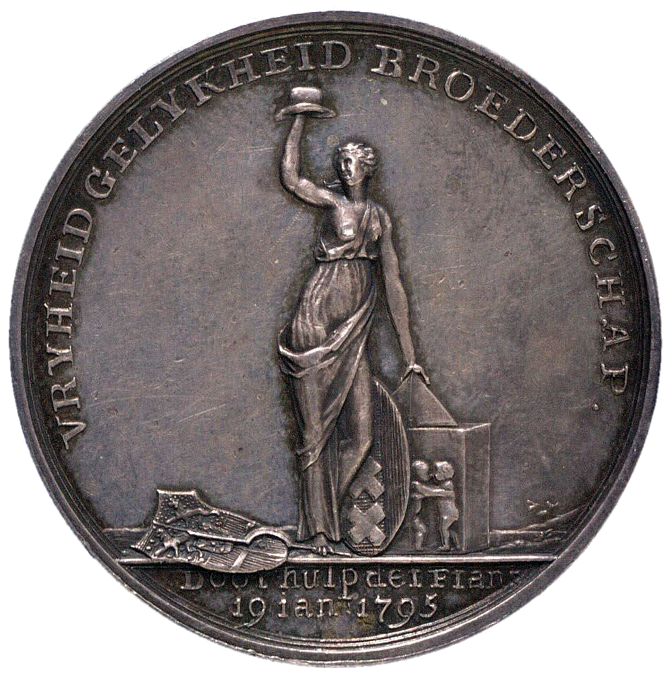 Herdenkingspenning 19 januari 1795, omwenteling te Amsterdam en het planten van de vrijheidsboom, 4 maart 1795 te Amsterdam